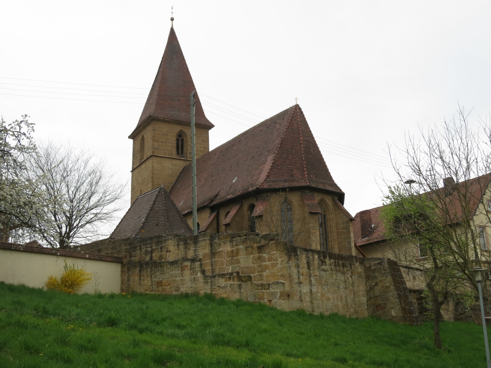 Kirche Seußling von Südosten